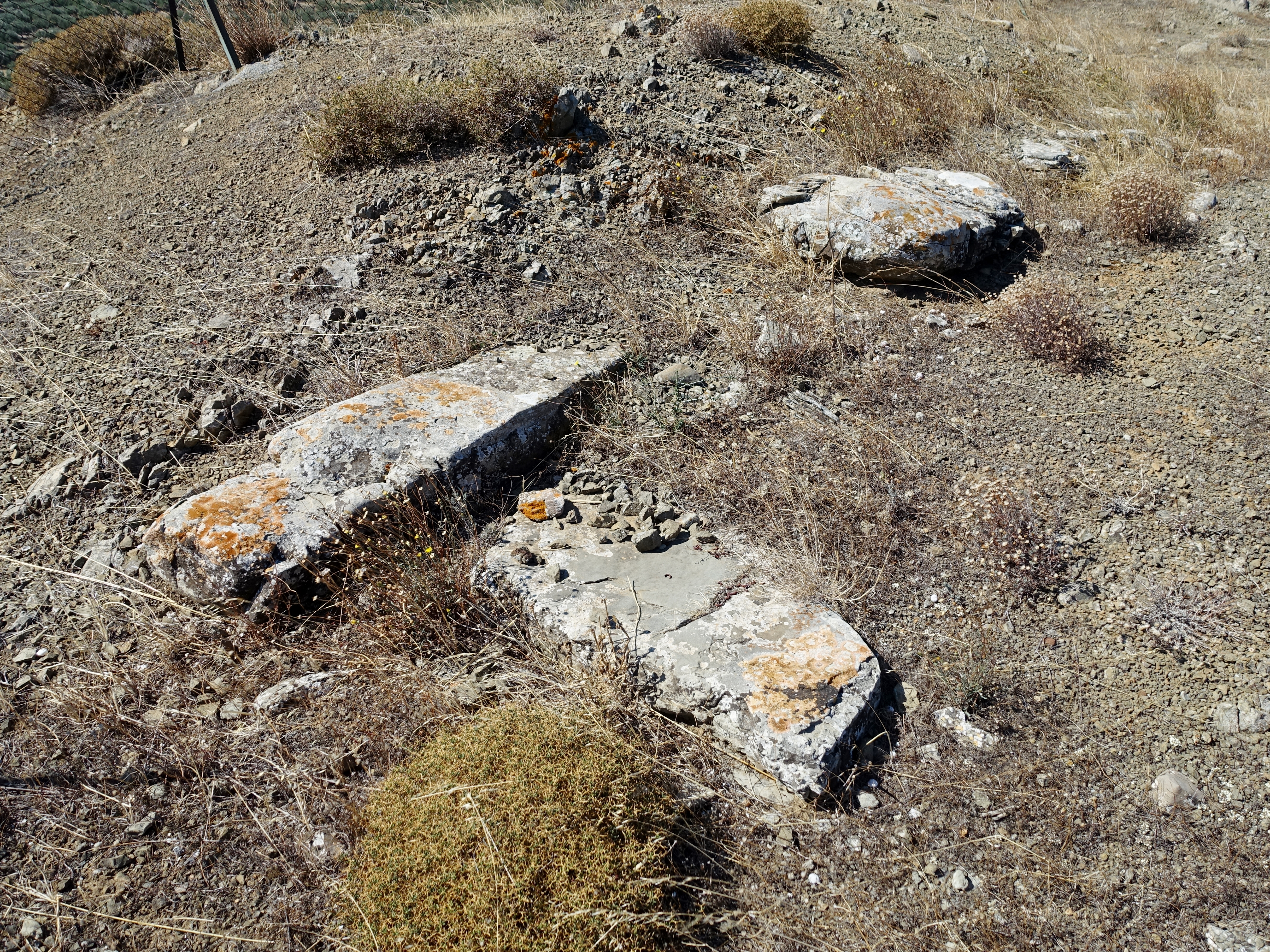 Ausgrabungsstätte von Kephali Lazana (Κεφάλι Λαζανά) bei Chondros (Χόνδρος), Gemeinde Viannos, Regionalbezirk Iraklio, Kreta, Griechenland